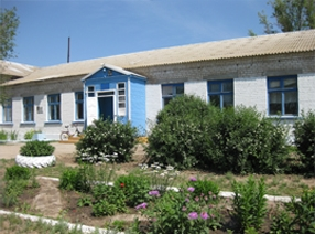 Урало-Ахтубинская средняя школа. Посёлок Катричев Быковского района Волгоградской области, Россия.